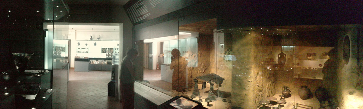 Accueil du museo dell'acqua de Chianciano Terme - Reconstitution de la Tombe Morelli entière avec son mobilier funéraire découvert intact.